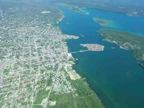 Santa Elena de la Cruz (Peten)